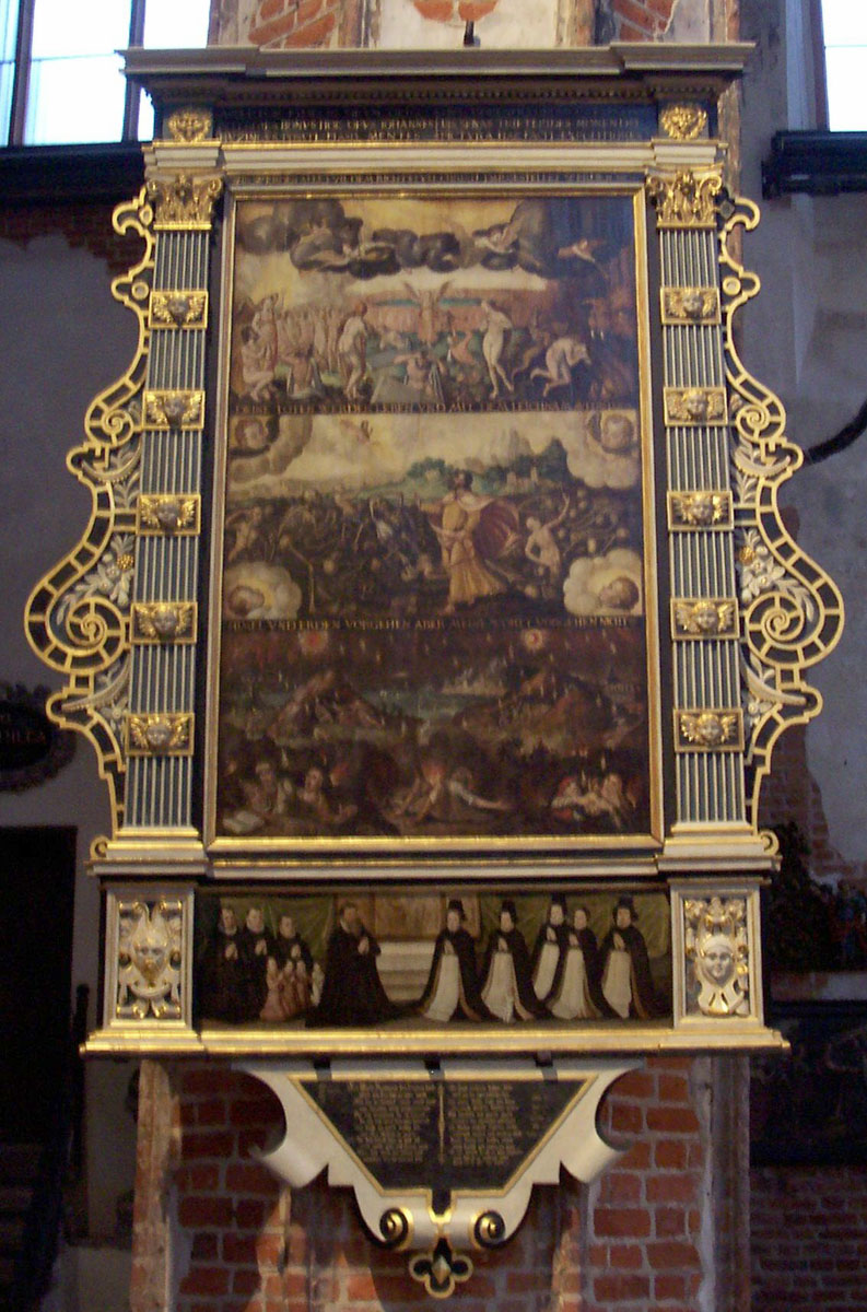 Gdańsk, Kościół św. Jana, epitafium Johanna Hutzinga, 1594